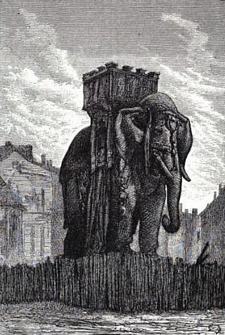 Illustration du roman Les Misérables. Quatrième partie - Livre 6 - Chapitre II : Où le petit Gavroche tire partie de Napoléon le Grand.